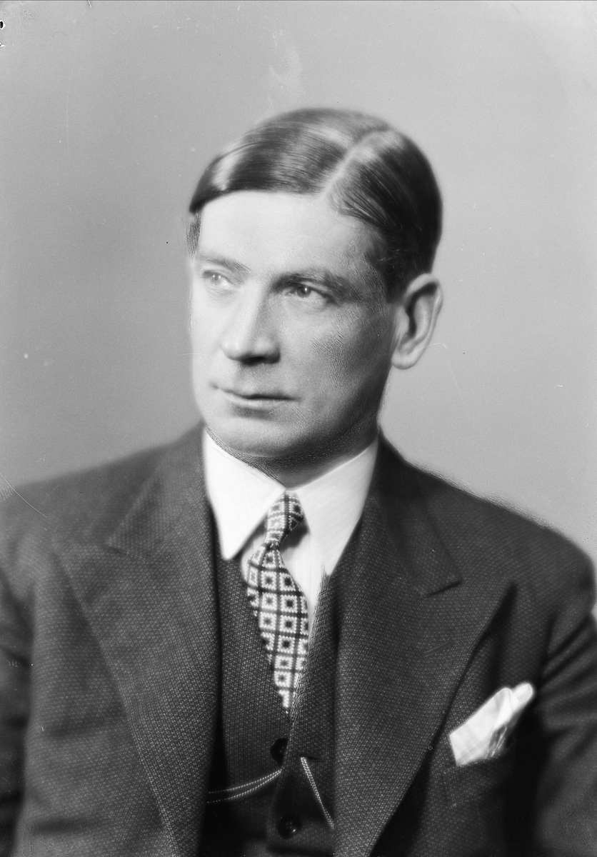 Portrett av August Martinius Oddvar (1933).